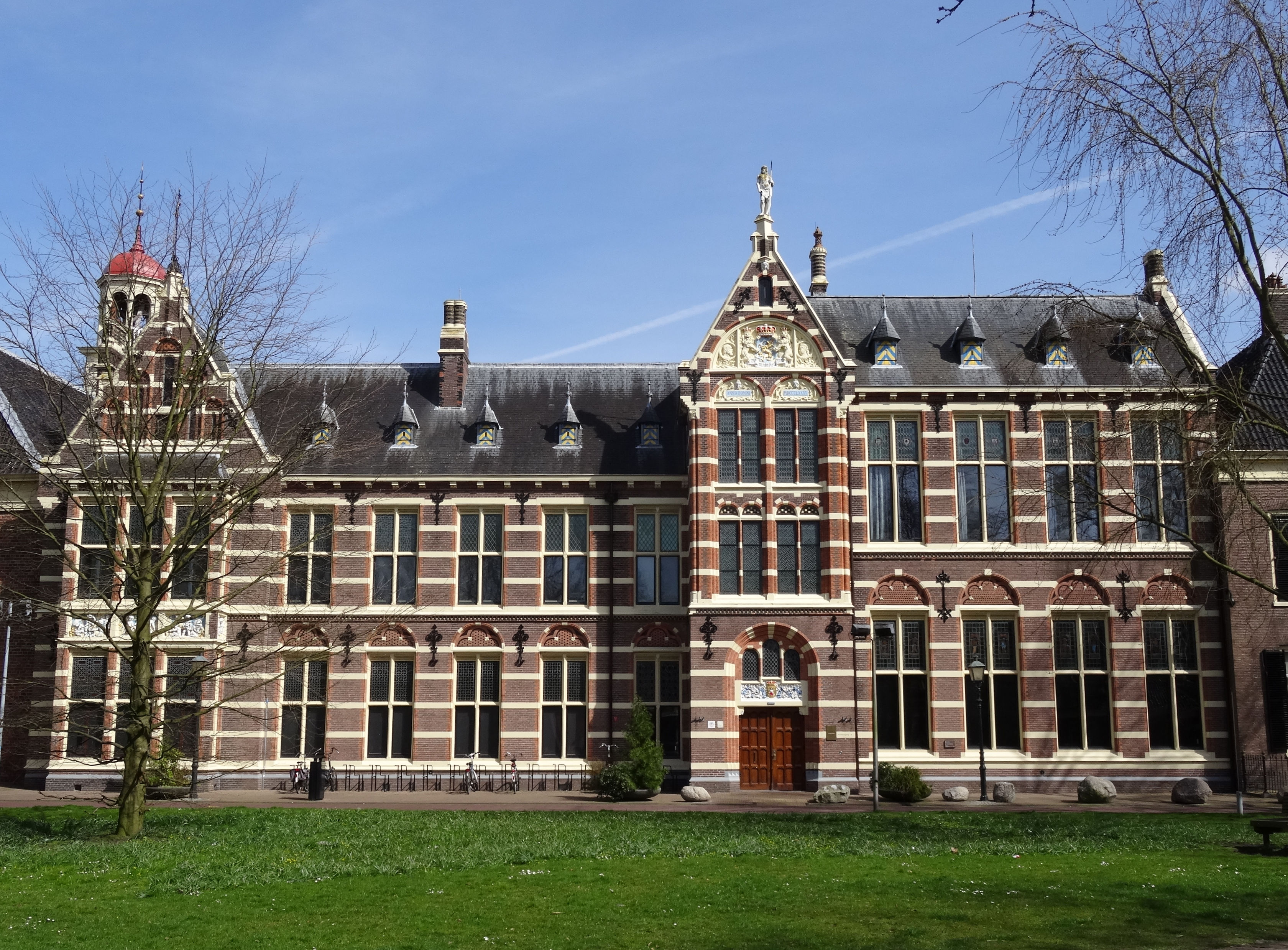 Gouvernementsgebouw Assen